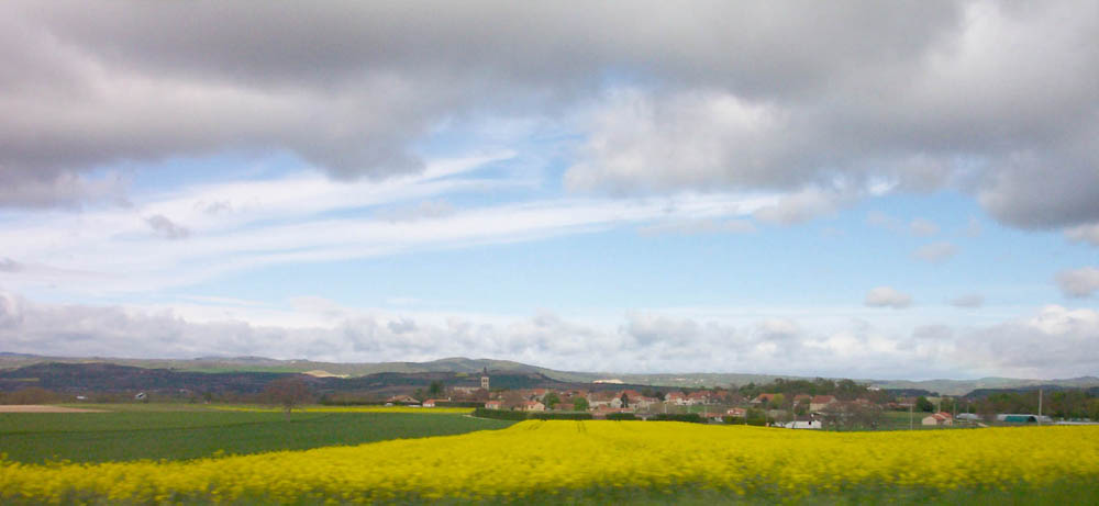 La Moutade, commune du Puy de Dôme, France